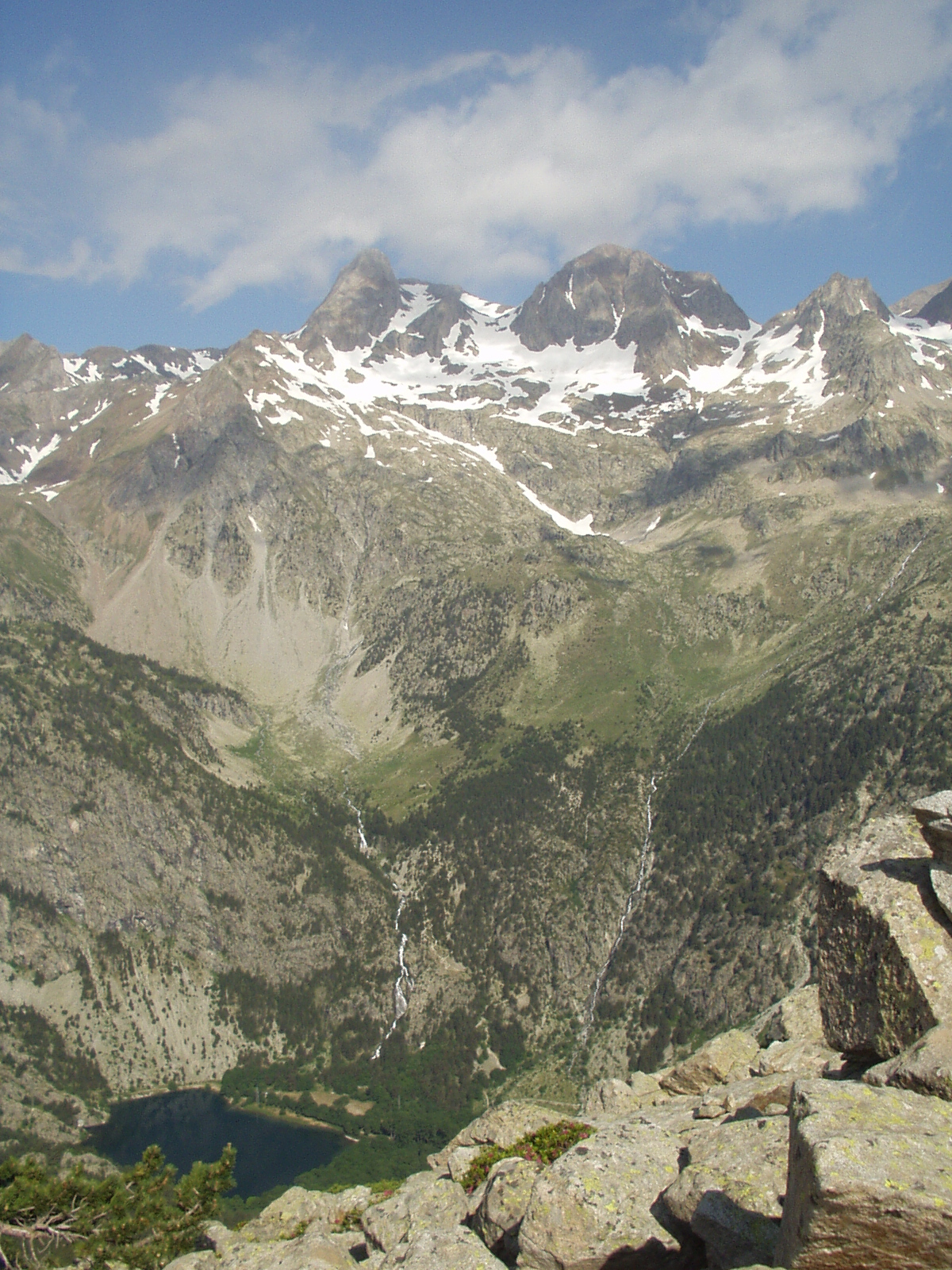 Macizo de Garmone Negro y Argualas, Panticosa (Huesca)